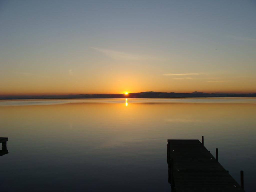 Atardecer en la Albufera